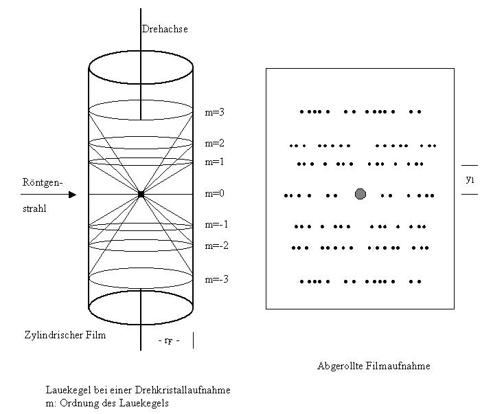 Schematische Darstellung einer Drehkristallaufnahme. Linkes Bild: Lauekegel Rechtes Bild: Der entwickelte Film